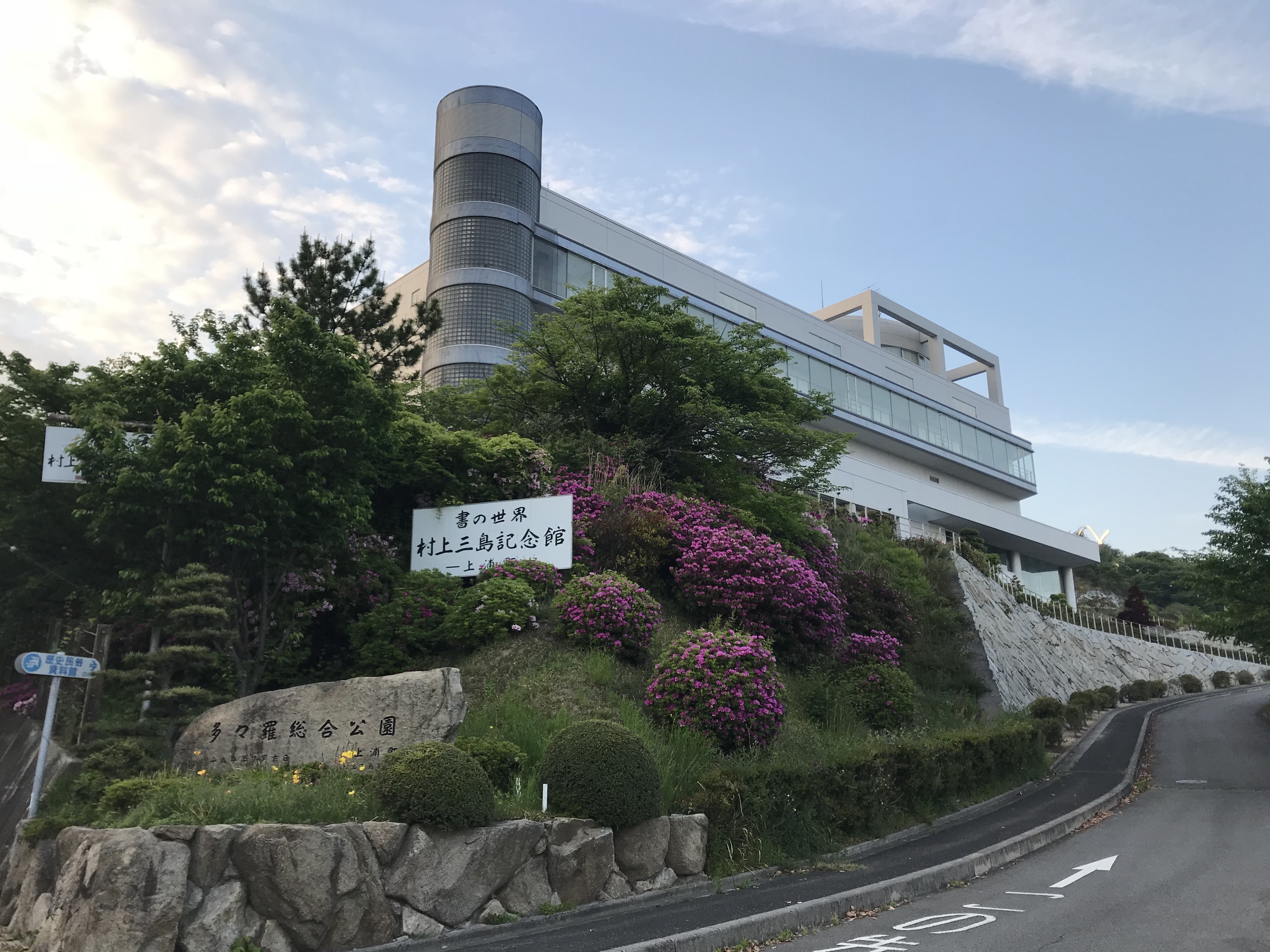 今治市上浦歴史民俗資料館(村上三島記念館)